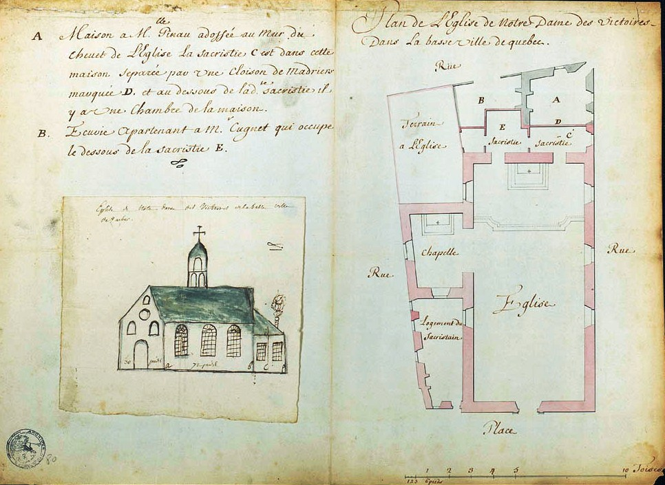 Plan et élévation de l'église Notre-Dame des Victoires « Construite en 1687-1688 sur l'emplacement de l'Habitation de Champlain et du Magasin du roi incendié quelques années auparavant, l'église est consacrée en 1690 à Notre-Dame-de-la-Victoire pour commémorer la défaite de l'amiral William Phips devant Québec. En 1711, à l'occasion du naufrage d'une grande partie de la flotte de l'amiral Hovenden Walker, elle est nommée Notre-Dame-des-Victoires. »